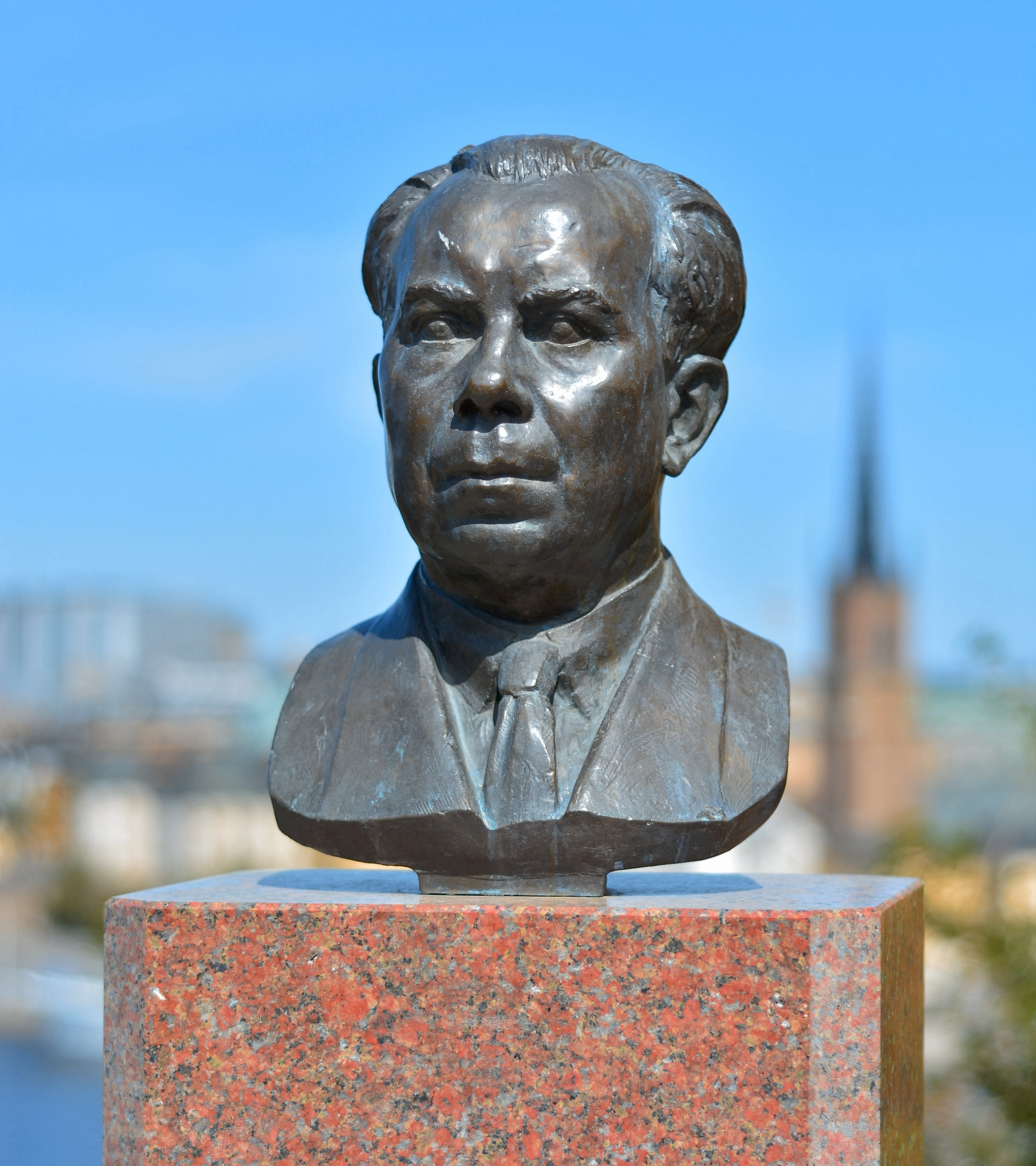 Ivar Lo-Johanssons byst i brons av Nils Möllerberg, Ivar Los park på Södermalm i Stockholm.